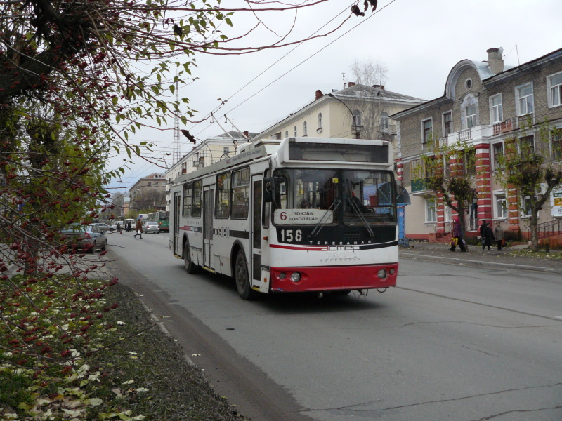 6 троллейбус "Околица-Вокзал"